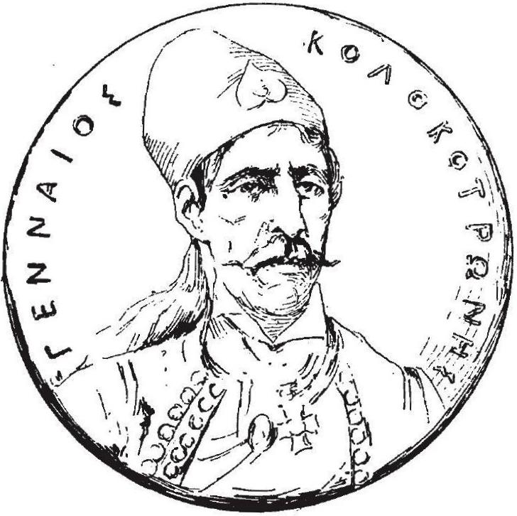 griechischer Regierungspolitiker, 1896